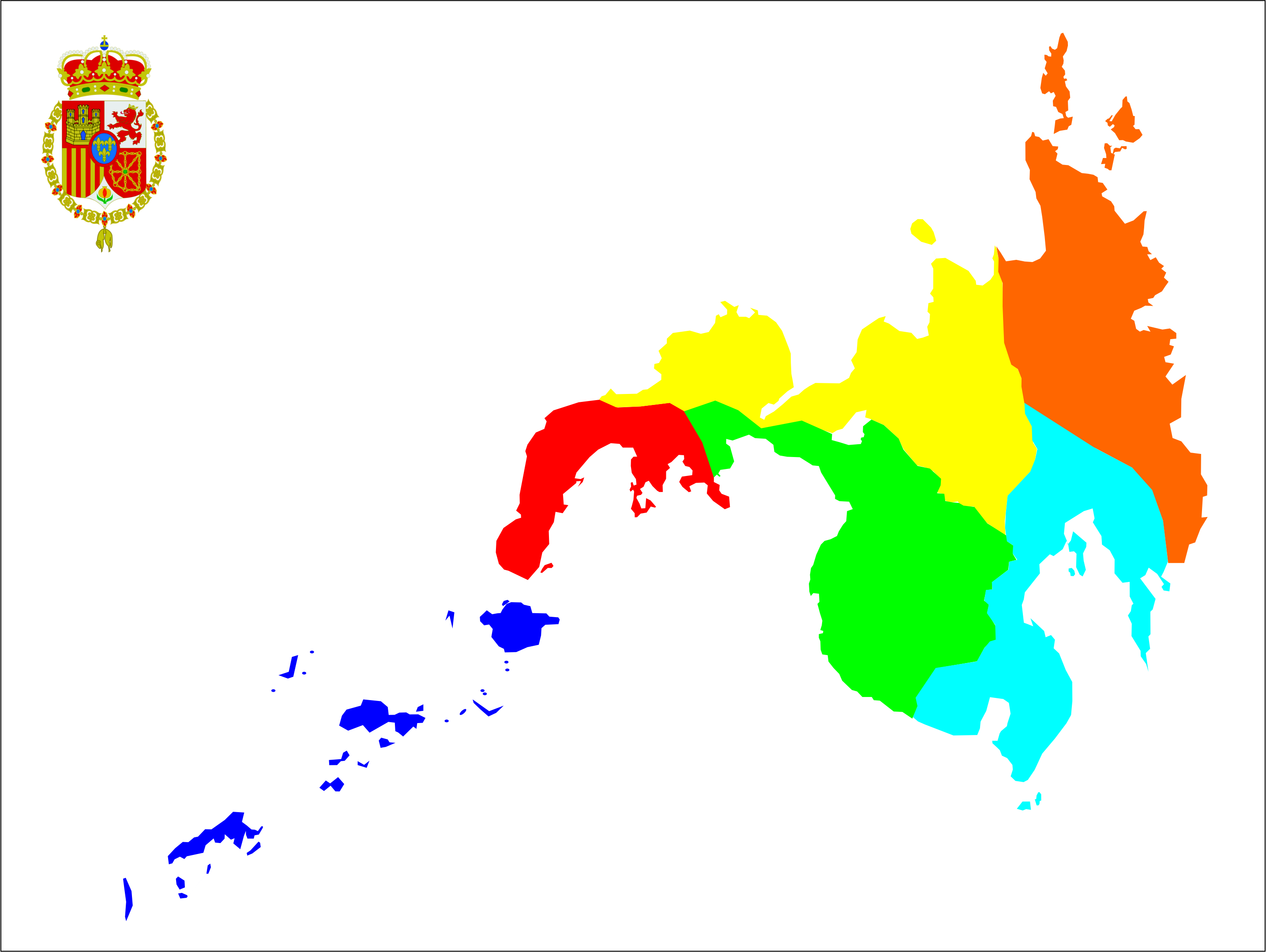 El seis (vi) Distrito Politico-Militar de La Isla de Gran Molucas (Mindanao), Las Islas Filipinas - Indias Orientales Española en 1860